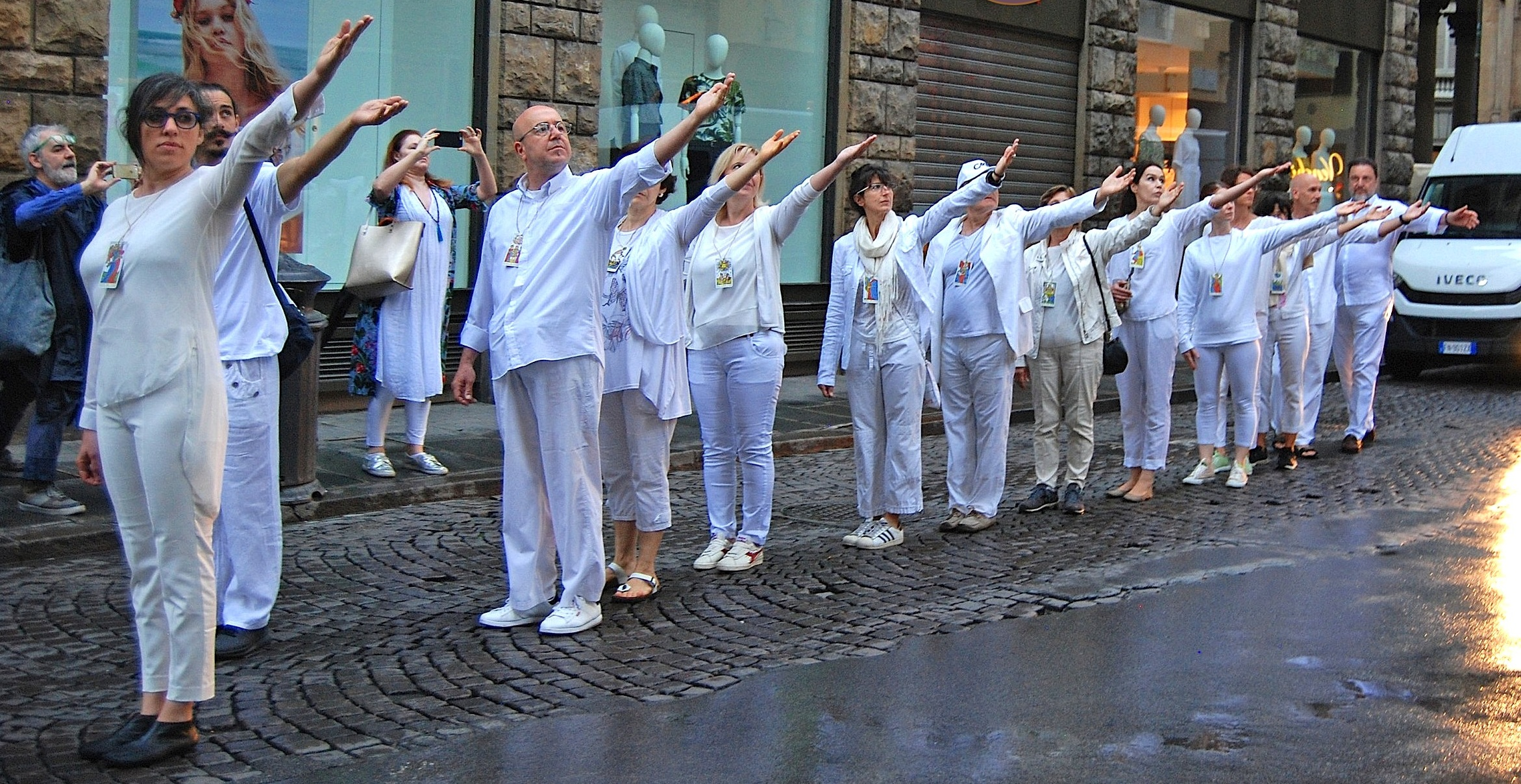 Nella fotografia si vedono i partecipanti alla "Passeggiata Jodorowski" mentre svolgono un'azione, durante questa passeggiata senza mai curvare, tenuta nel centro storico di Firenze, da piazza San Lorenzo a Ponte Vecchio, durante l'edizione 2018 del Festival del Viaggio. L'evento è stato ideato dal Festival del Viaggio.